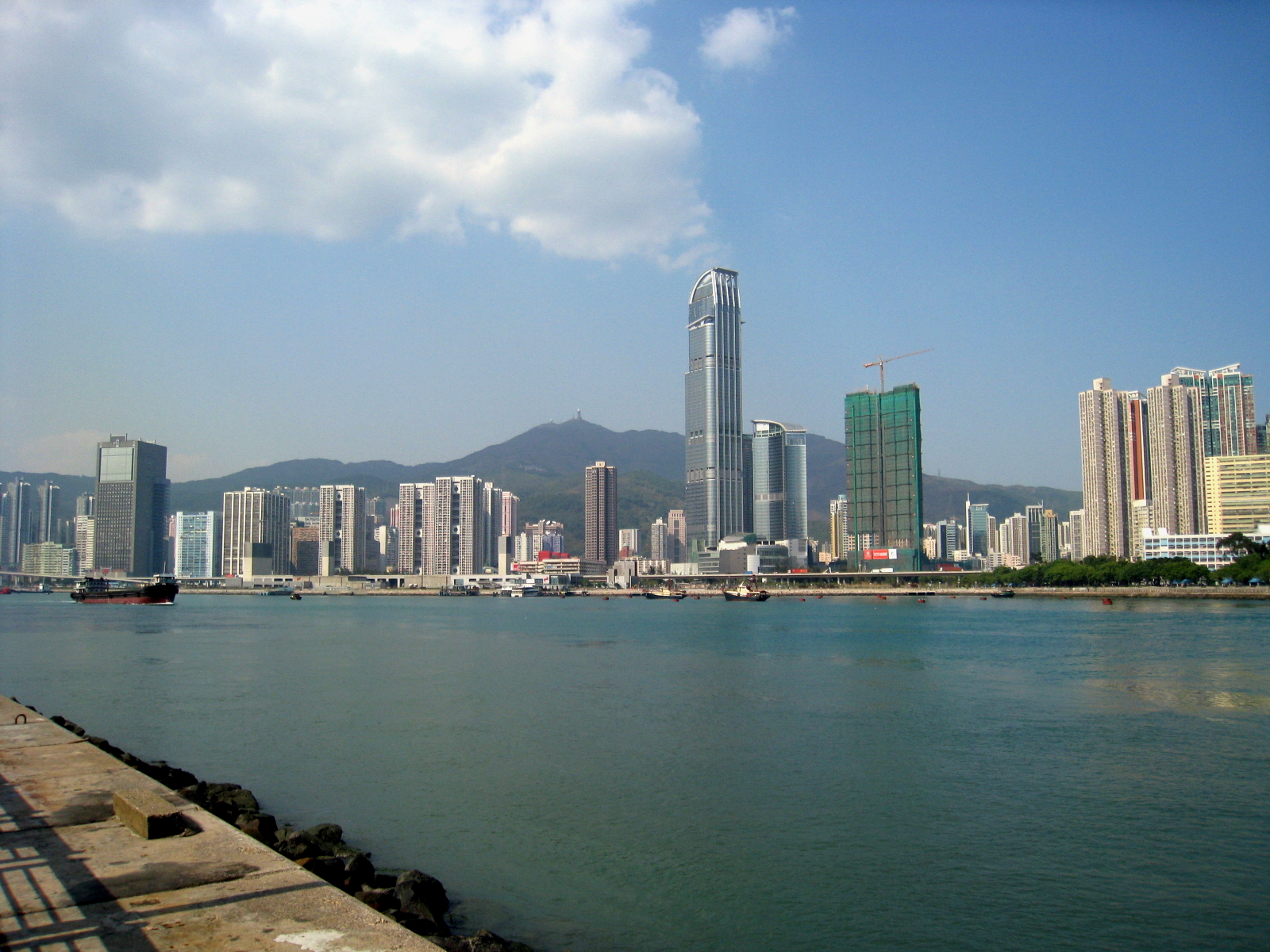 HK Tsuen Wan View 200803